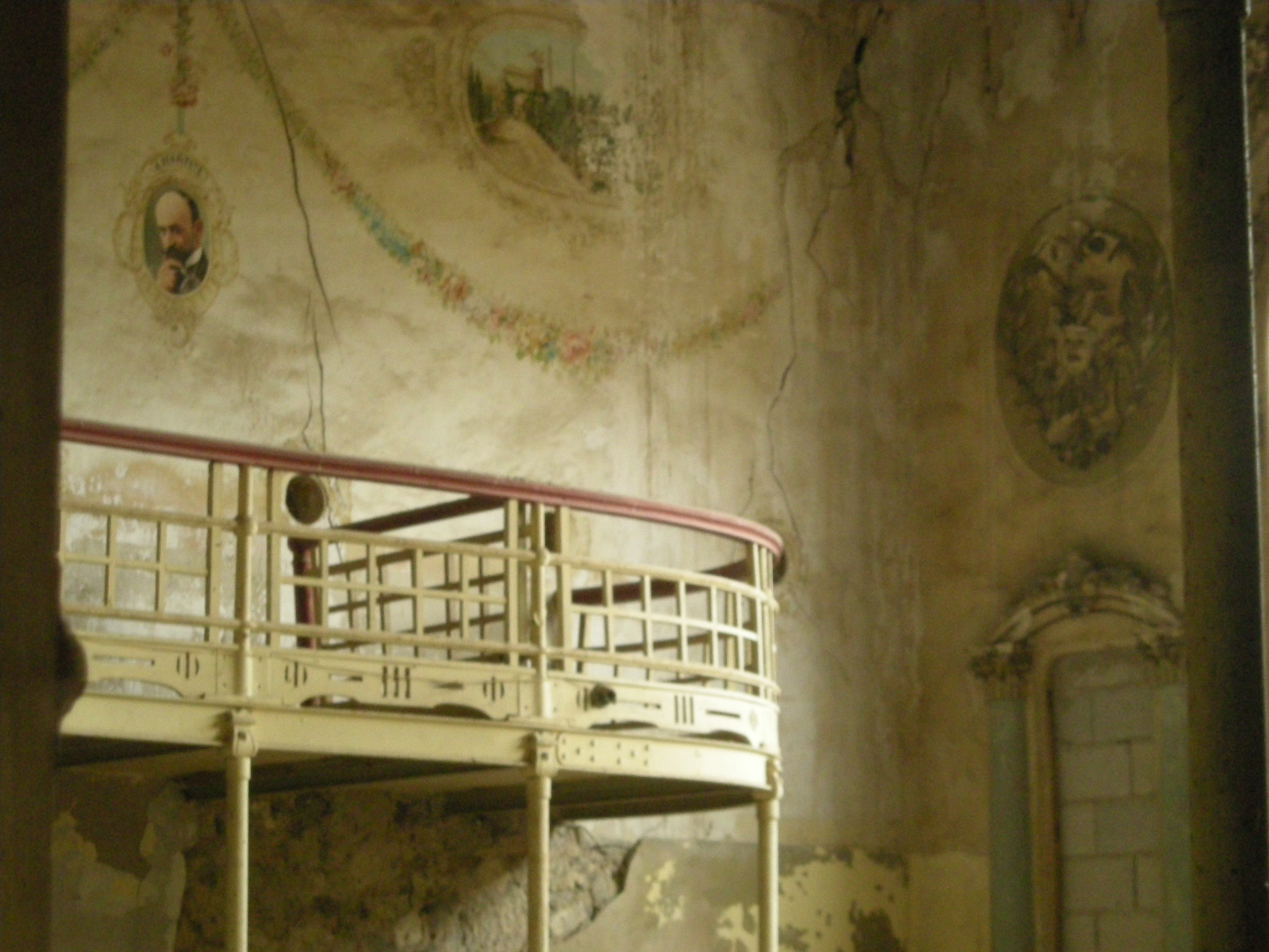 Interior del Teatro Cervantes en la Colonia de Santa Eulalia, pedanía de Villena y Sax; a la izquierda, sobre el palco, el retrato de Jacinto Benavente, al centro una imagen de la fábrica de Alcoholes La Unión y a la derecha una moldura y uno de los accesos a bambalinas, tapiado.